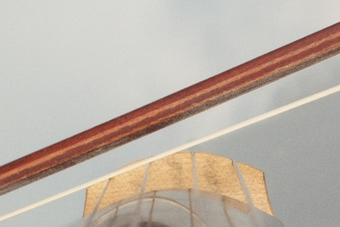 cello bow and bridge